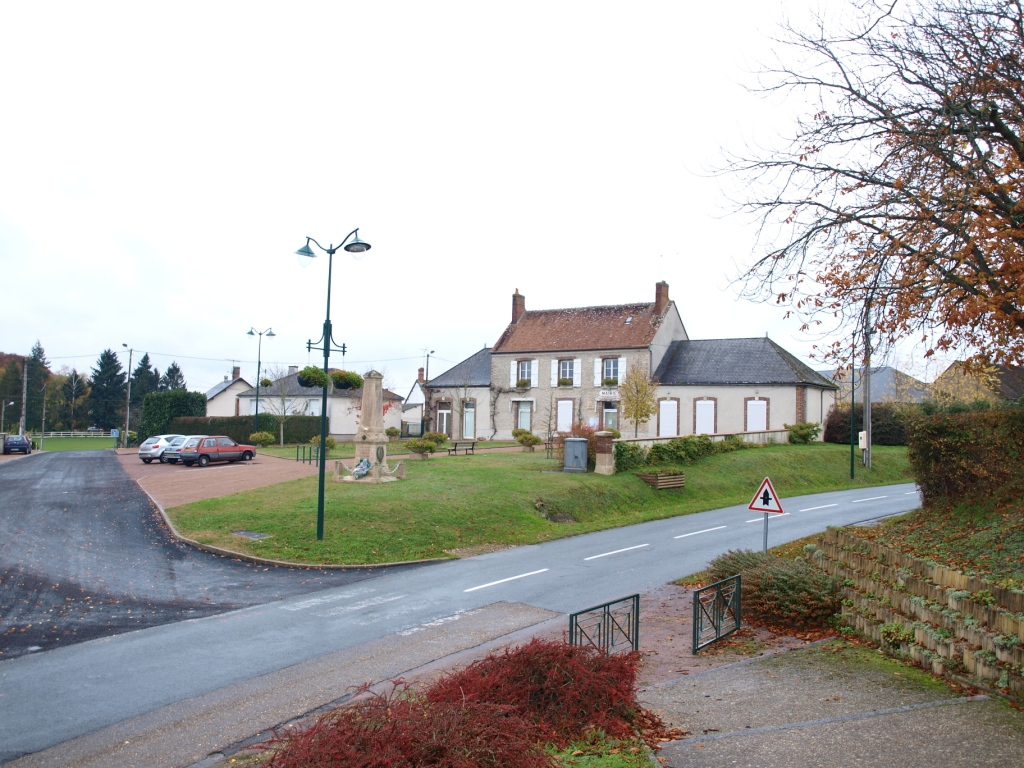 La Selle-en-Hermoy (Loiret, France), place de la mairie.